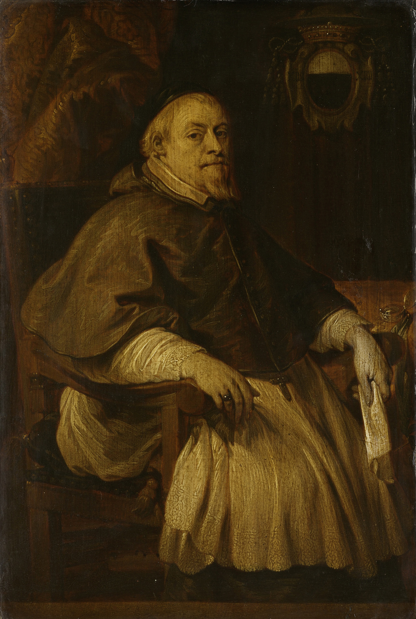 Portret van François Vilain de Gand, baron van Rassenghem, bisschop van Doornik. Zittend in een stoel bij een tafel, een papier in de linkerhand. Rechtsboven het bisschoppelijke wapen.